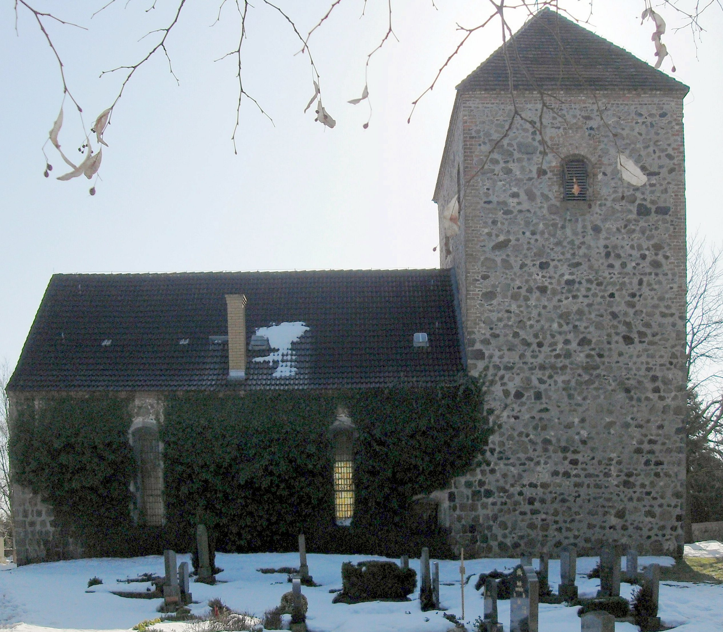 Kirche in Neuentempel, Gemeinde Vierlinden, Deutschland